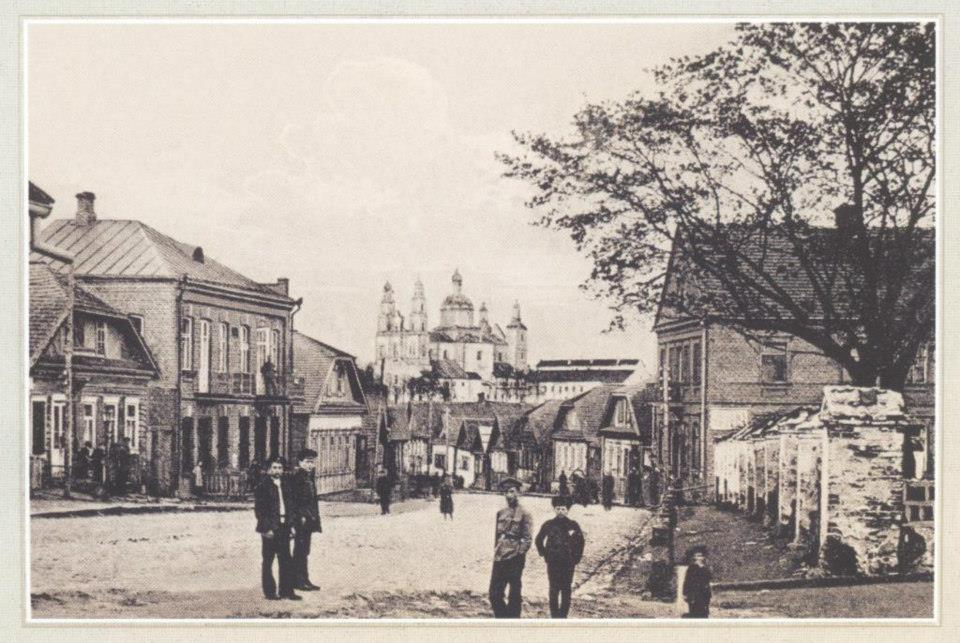 Беларуская (тарашкевіца): Глыбокае (Hłybokaje), вуліца Замкавая (vulica Zamkavaja)